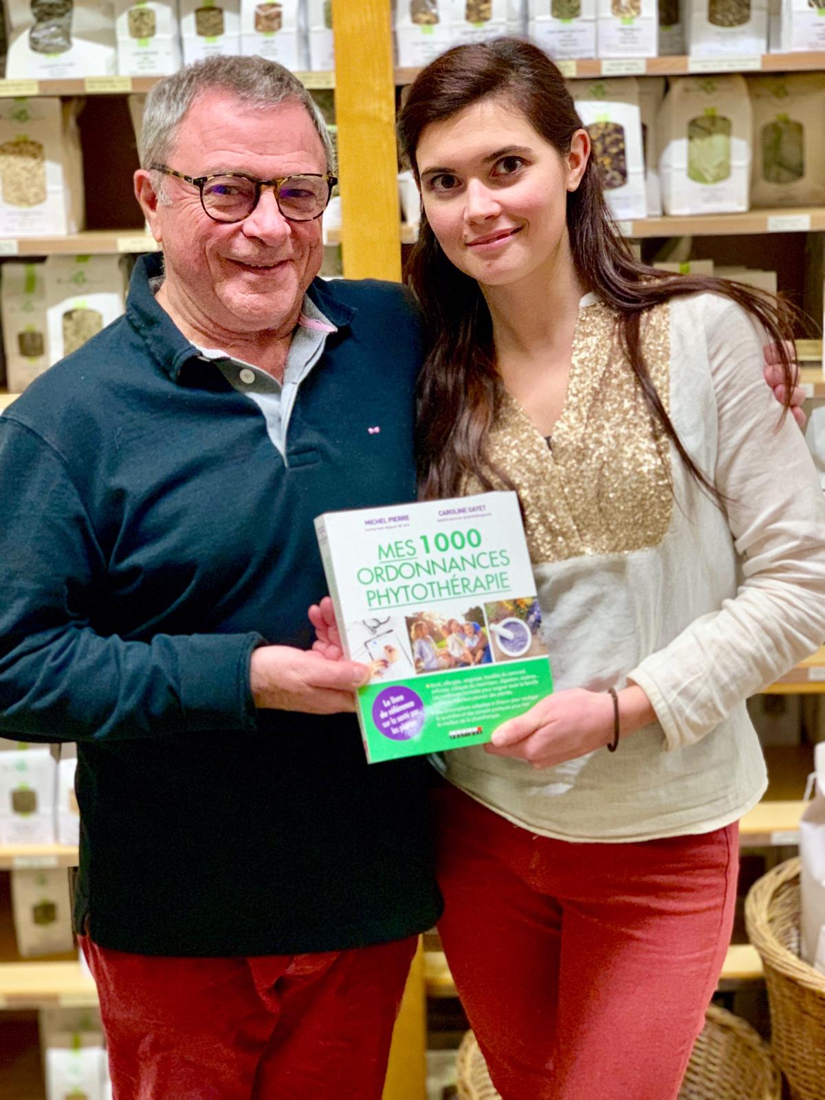 Michel Pierre et Caroline Gayet, co-auteurs de "Mes 1000 ordonnances de Phytothérapie"